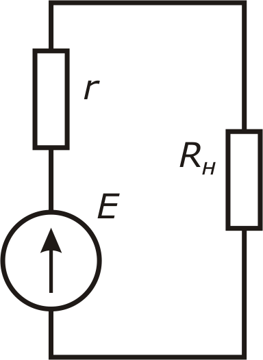 Рисунок 2.